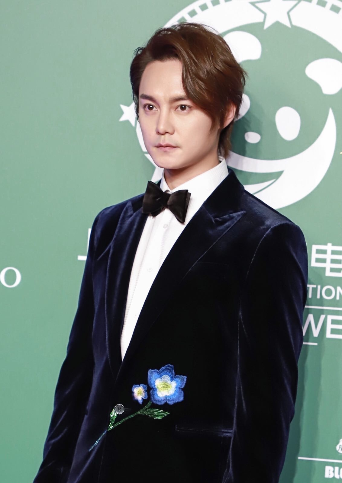 尹正